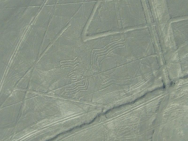 Nasca (Peru), Spider, August 2007